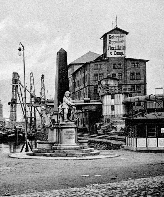 Der Flechtheimspeicher am Hafen Münster